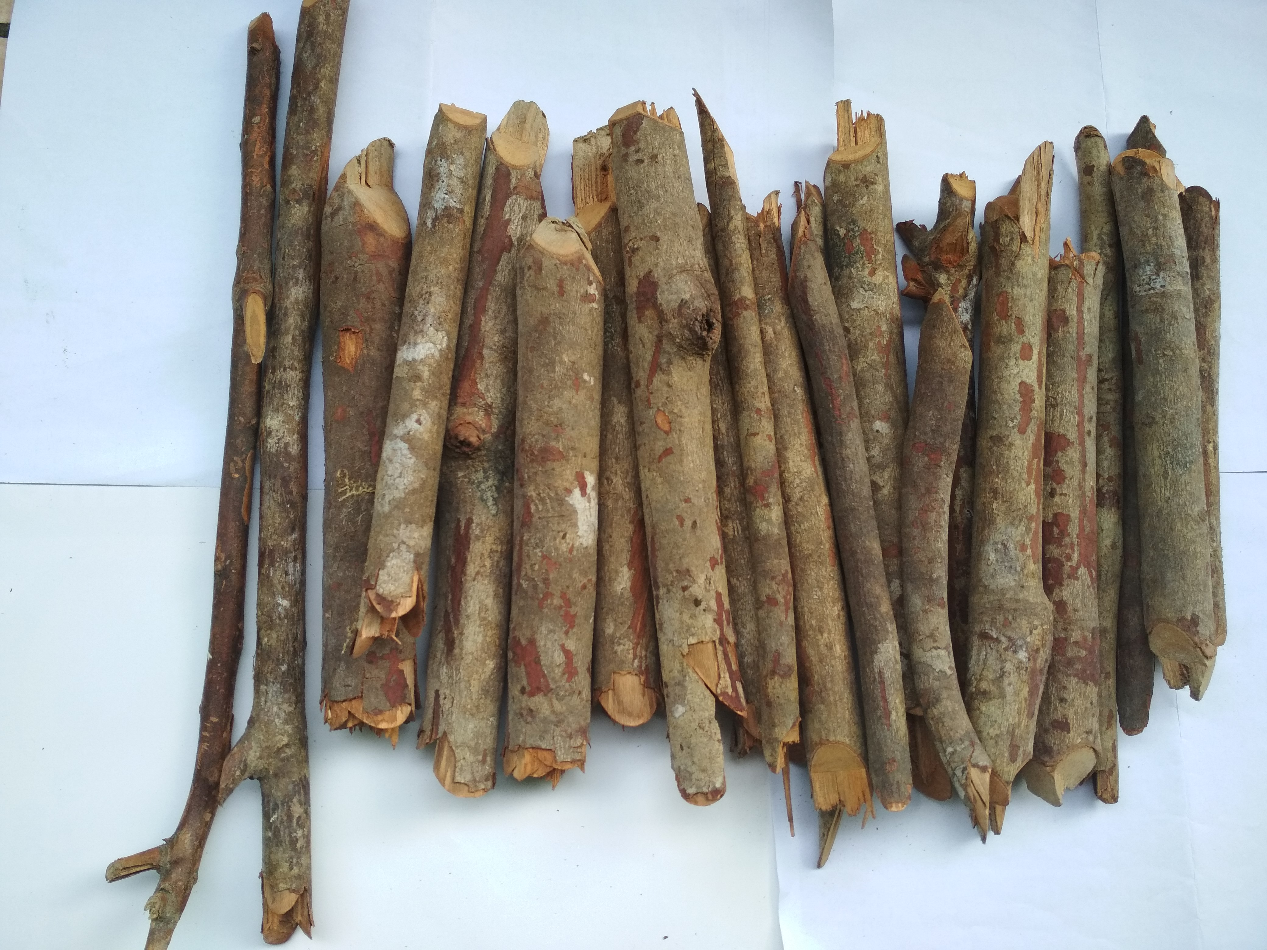 Kulit Batang Kayu Akway (Drymis sp) asal manokwari papua barat yang di ambil tahun 2018